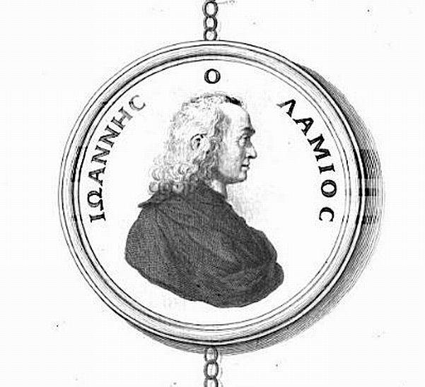 Porträt des Giovanni Lami (1697-1770) Frontispiz der unten genannten Quelle